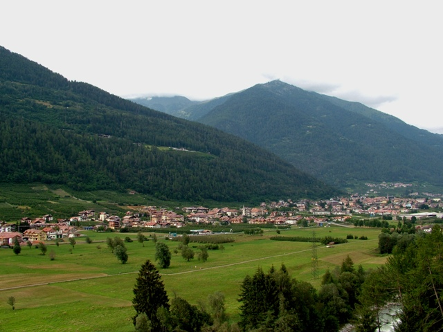 Panorama del paese di Croviana con Malè sullo sfondo